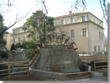 Imagen del canal de Vedène a su paso por el molino del Instituto Profesional de Vedène.